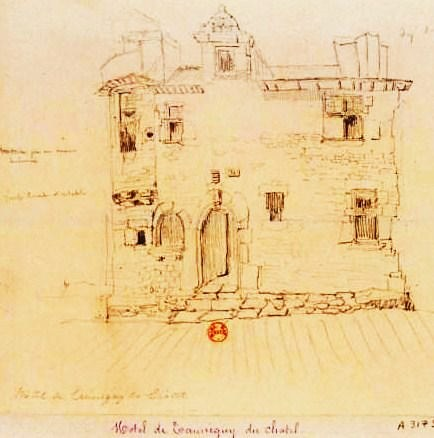 Brest : l'hôtel de Tanneguy du Châtel à Recouvrance (date précise inconnue, XIXe siècle)